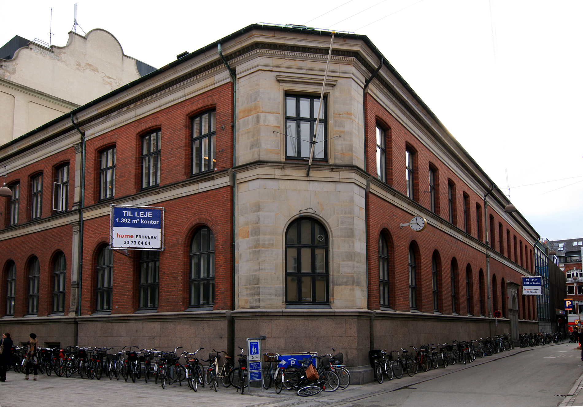 Bikuben, Silkegade 6-8, København. Bygget 1882, Fredet.